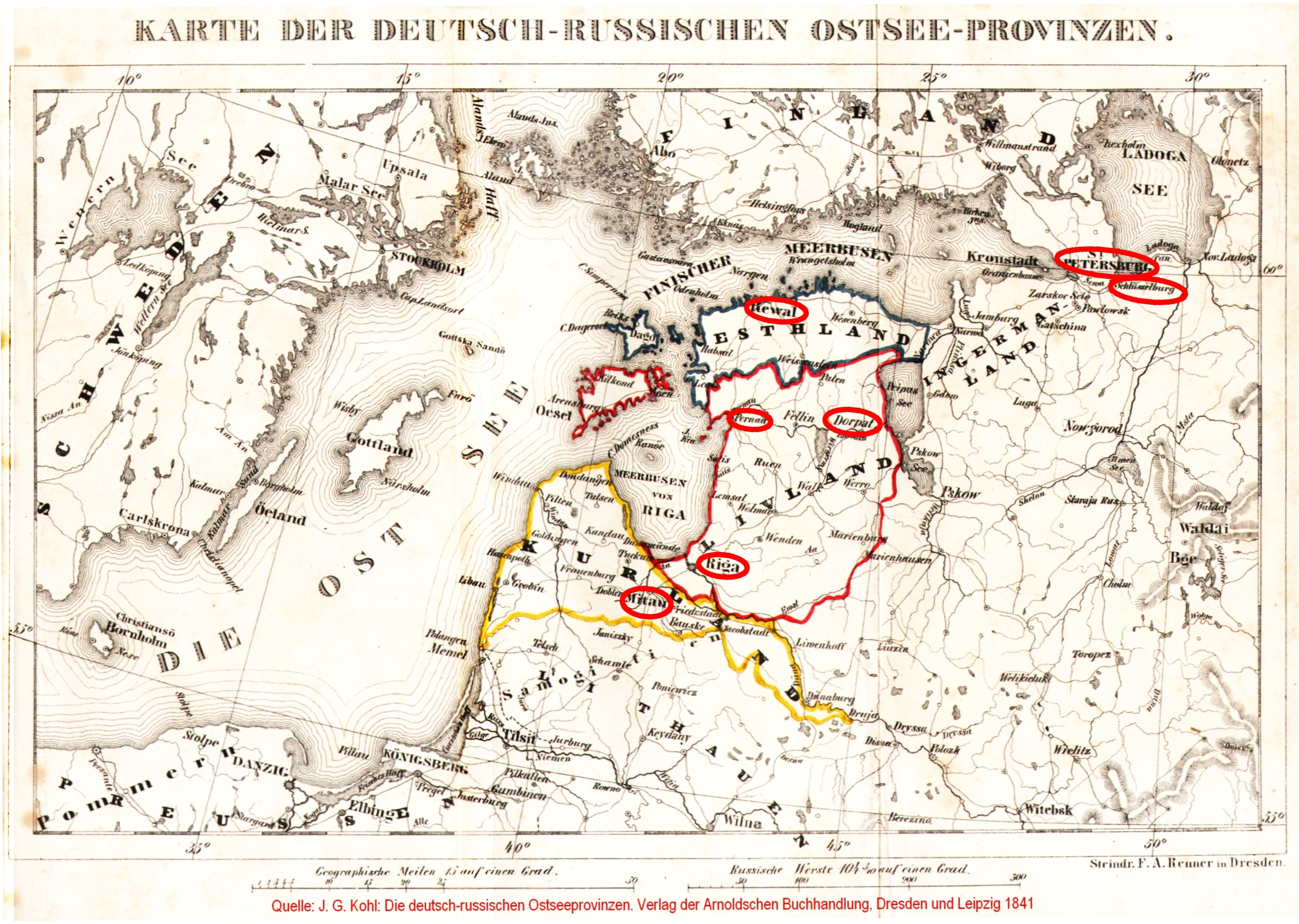 Information zu dem Buch von Jaan Kross: "Der Verrückte des Zaren". Die Handlungsorte wurden markiert auf der Datei "Kohl, Karte der deutsch-russischen Ostseeprovinzen.jpg" Die ehemaligen (und heutigen) Namen der Orte sind: Reval (Tallinn), Riga (Rīga), Dorpat (Tartu), Mitau (Jelgava), Pernau (Pärnu), St. Petersburg( Санкт-Петербург) und Schlüsselburg (Шлиссельбург)